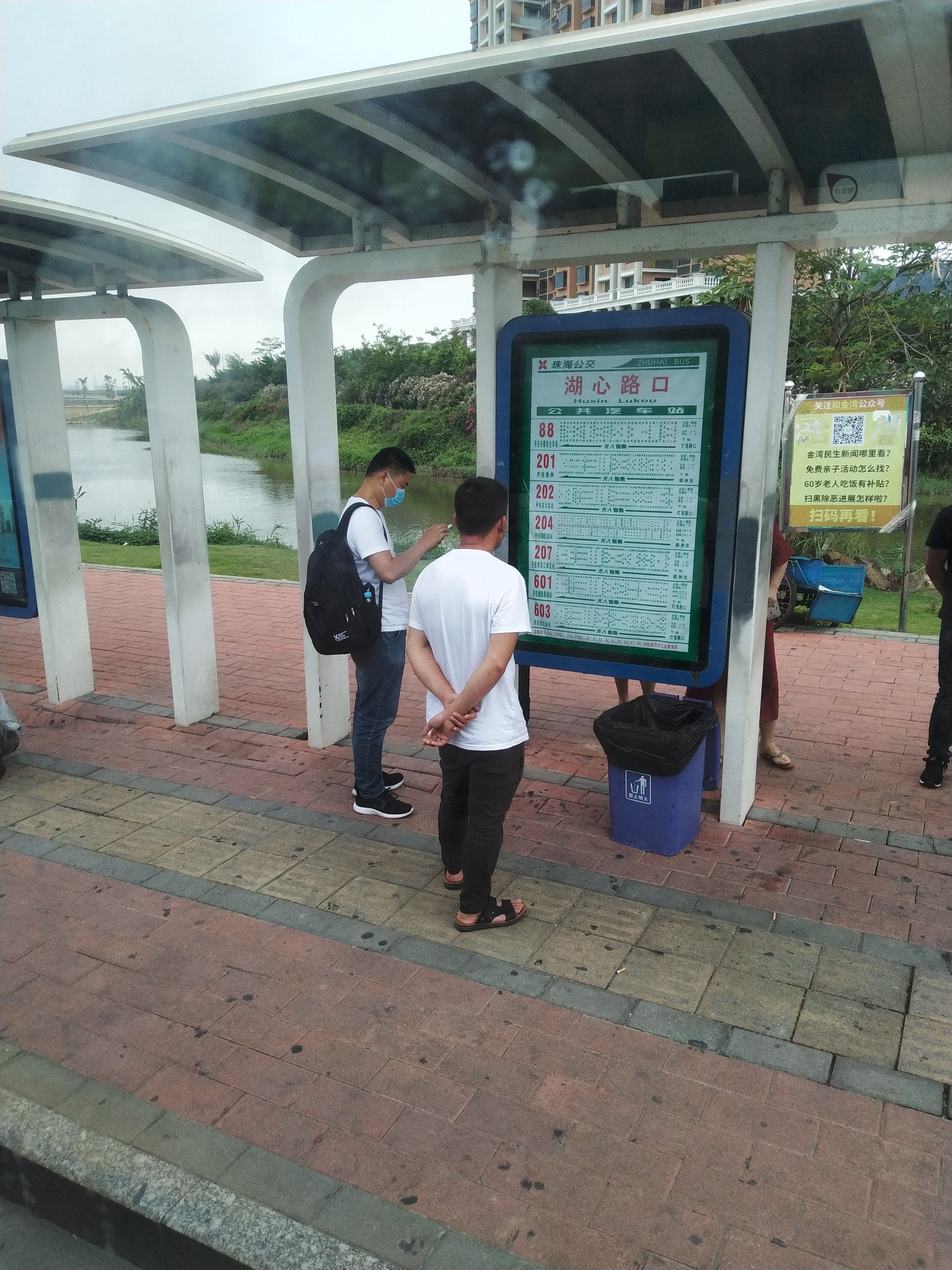 中文（中国大陆）: 湖心路口公交站站牌，香洲区方向